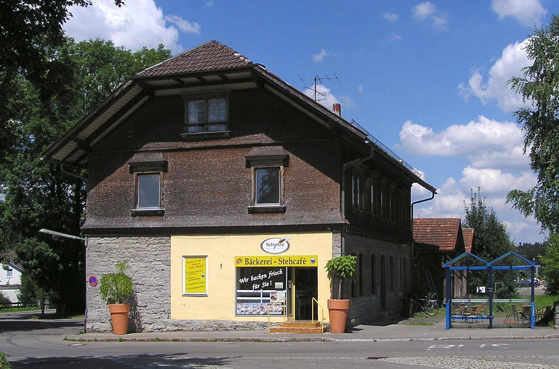 ehem. Bahnhofsgebäude von Weiler im Allgäu (Weiler-Simmerberg, Bayern, Deutschland)This is a photograph of an architectural monument.